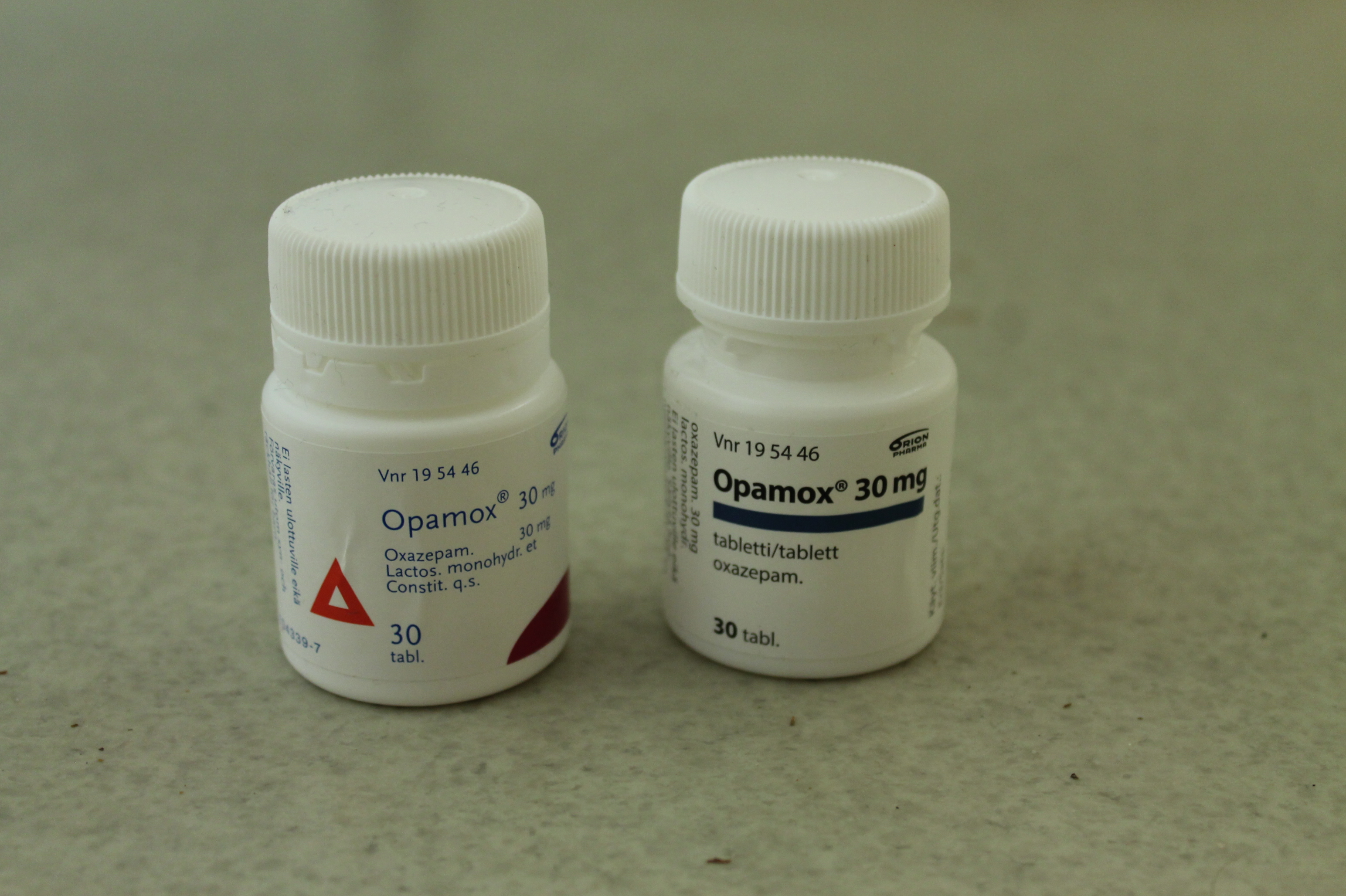 Oxazepam 30 mg tablets